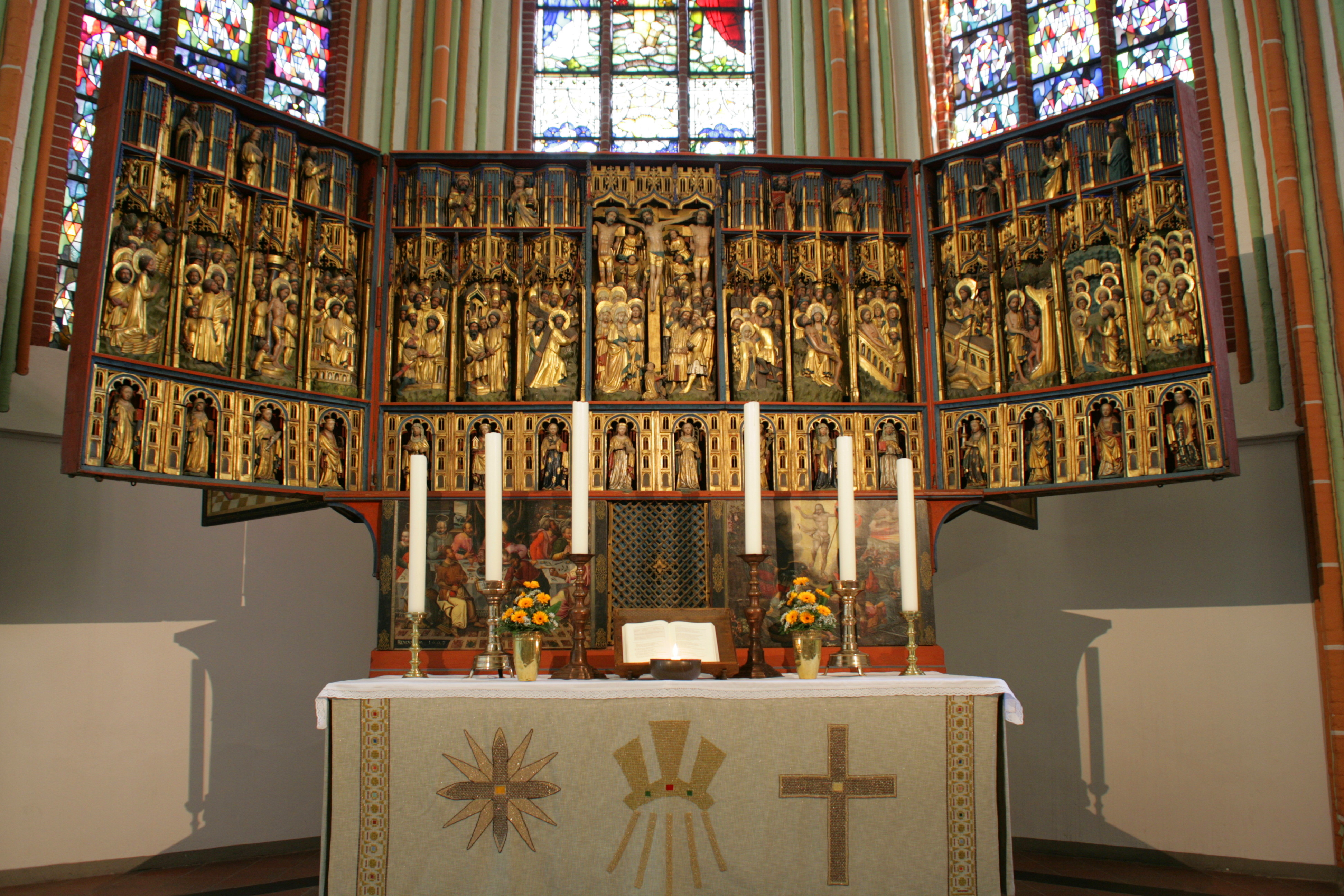 St. Johannis in Lüneburg